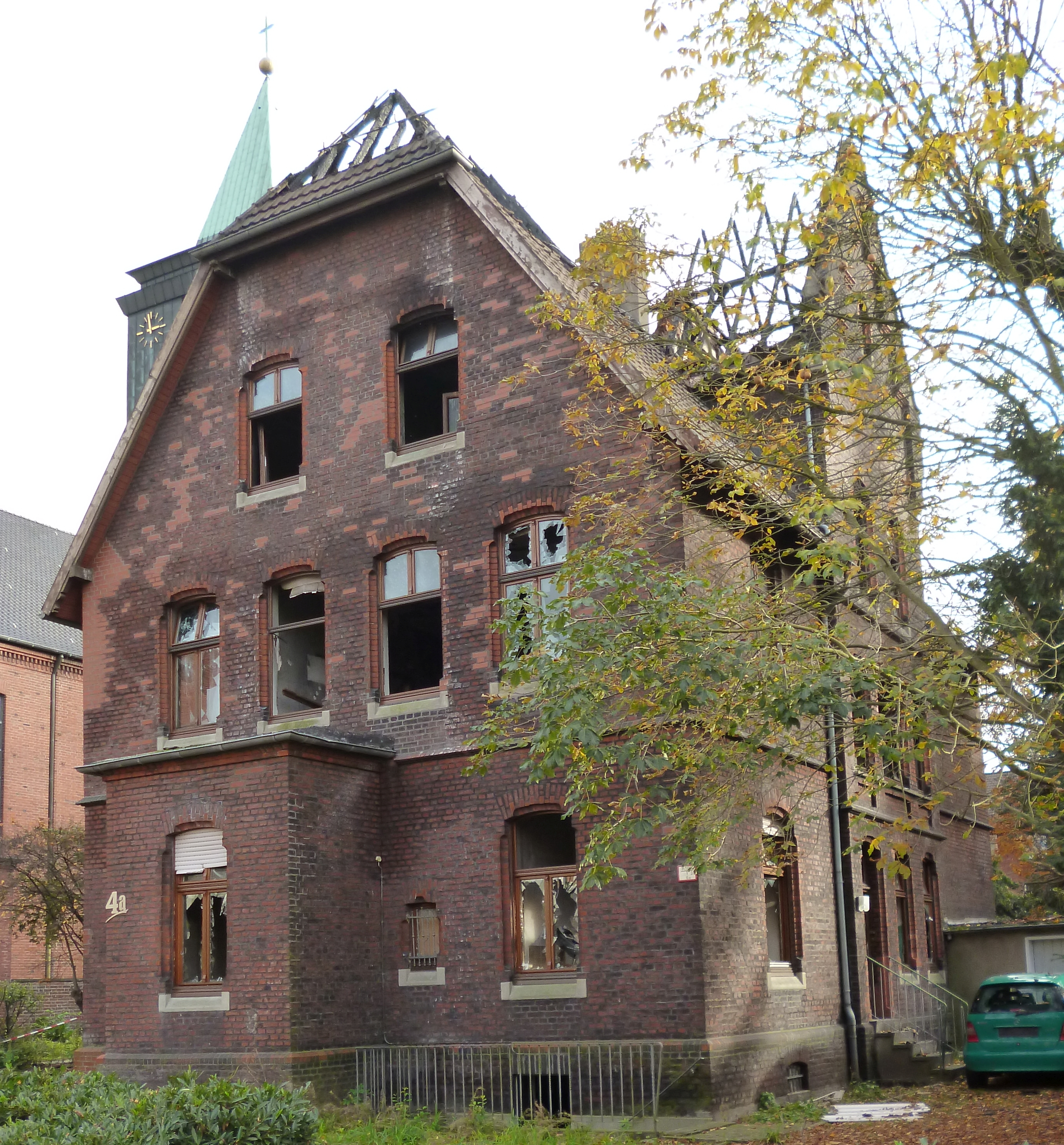 Ehemaliges Pfarrhaus St. Marien in Herne-Eickel, Herzogstr., nach dem Brand vom 15. Oktober 2016, gesehen von der Marienstraße in Höhe Hausnummer 2, Blick auf Vorderfront und rechten Eingang